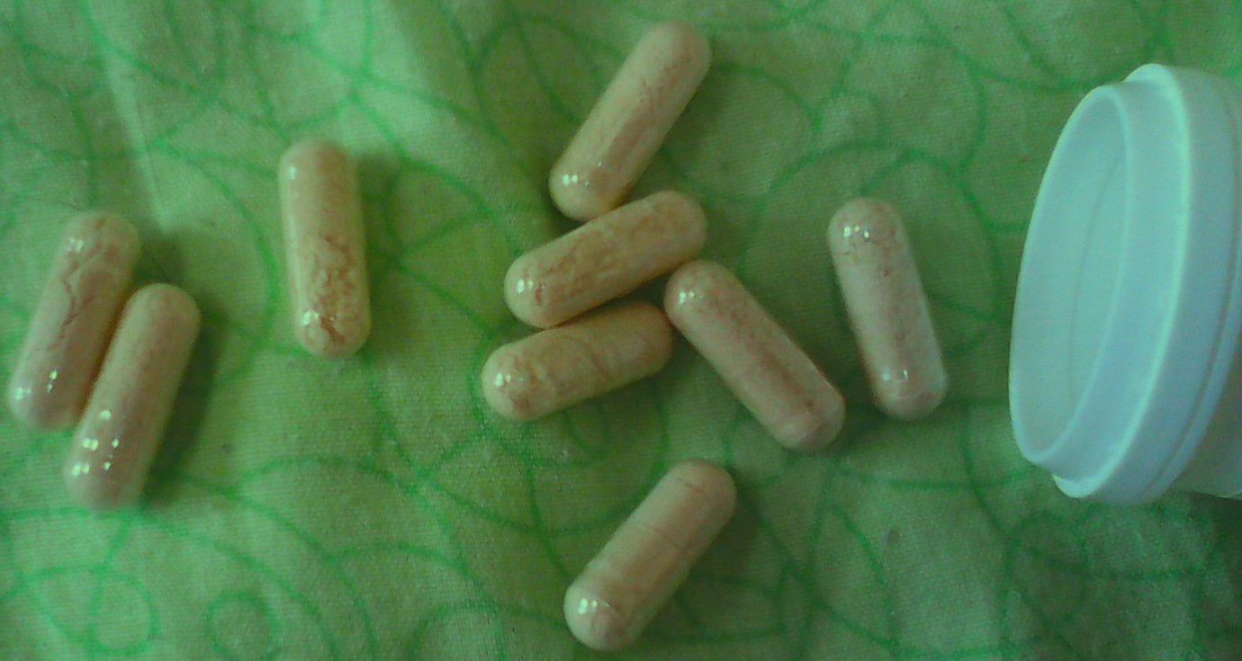 Разновидность желатиновых капсул - вагинальная капсула. Непатентованное международное название - Лактобактерии ацидофильные (Lactobacillus acidophilus) 100 000 000 КОЕ. Коммерческое - Лактонорм (Lactonorm).